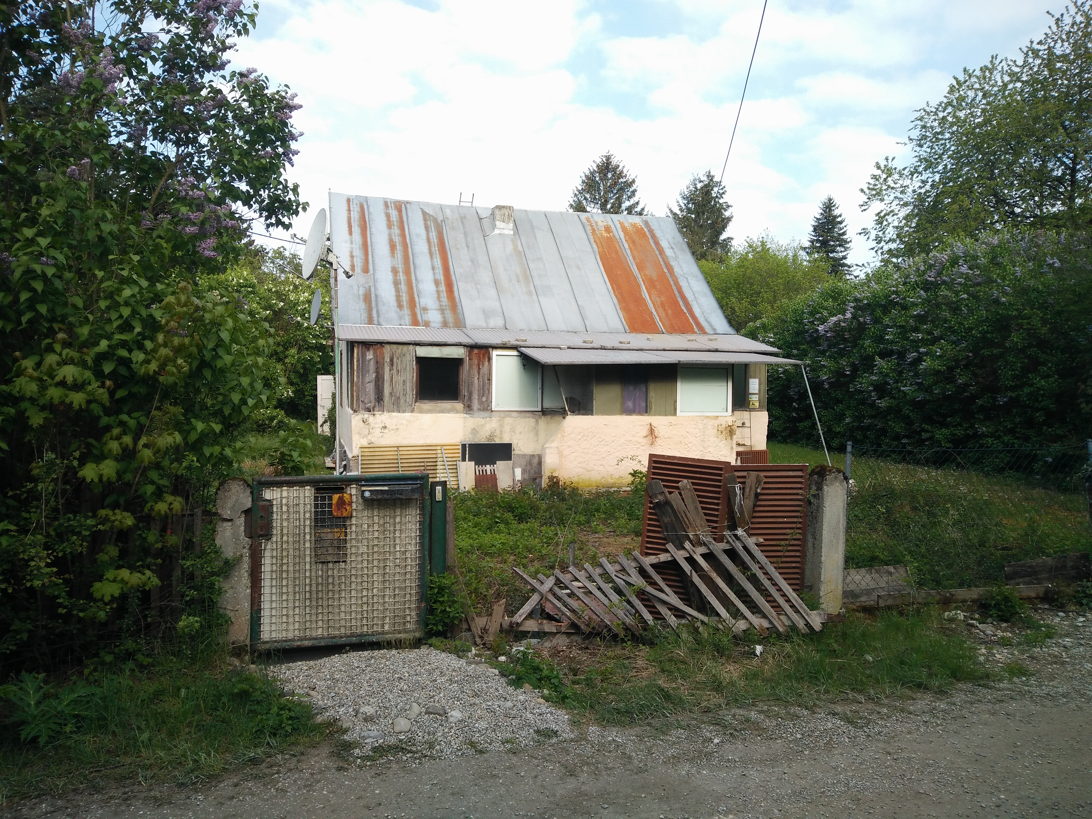 Eggarten altes Haus